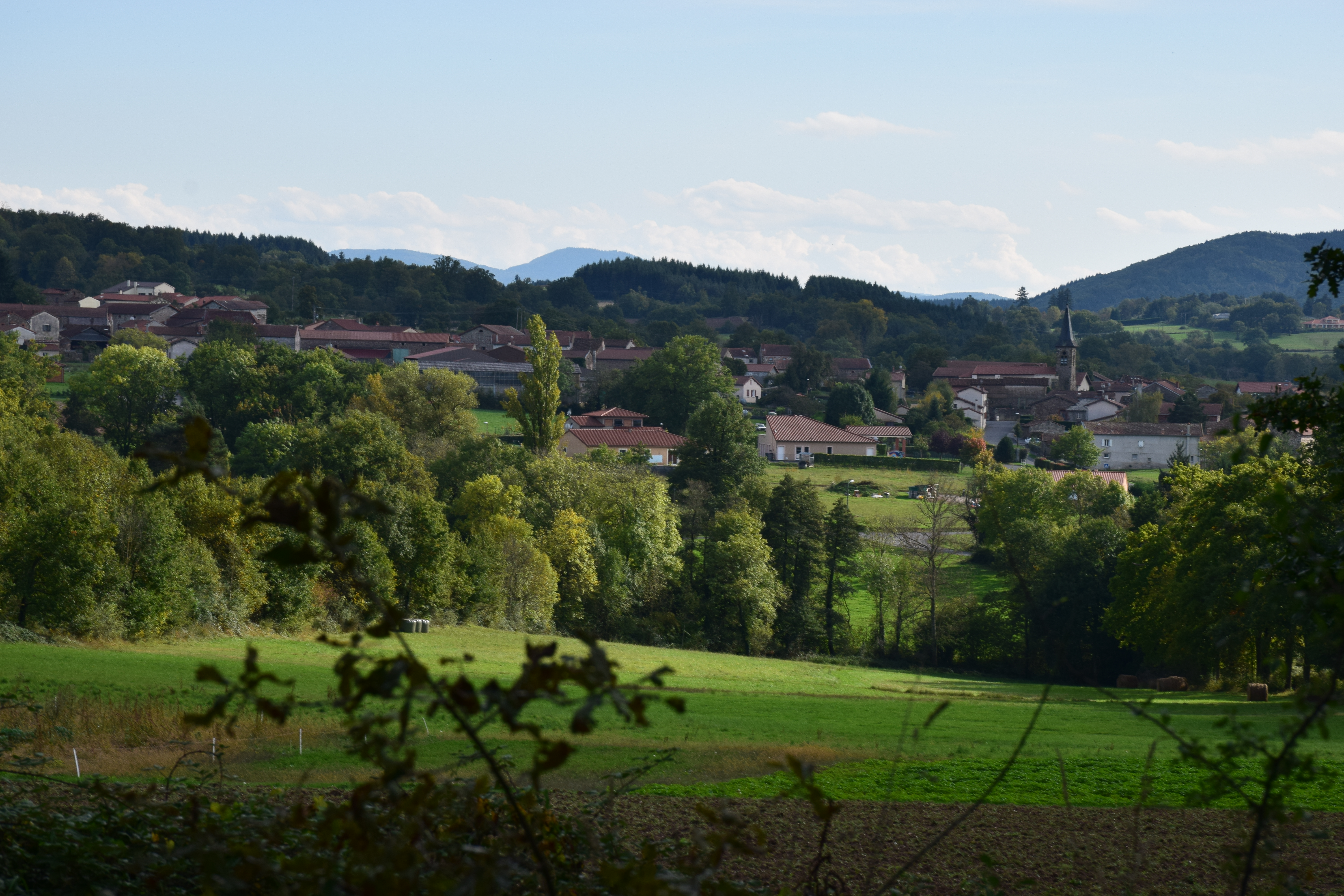 Vue de Javaugues (département de la Haute-Loire, région Auvergne, France).